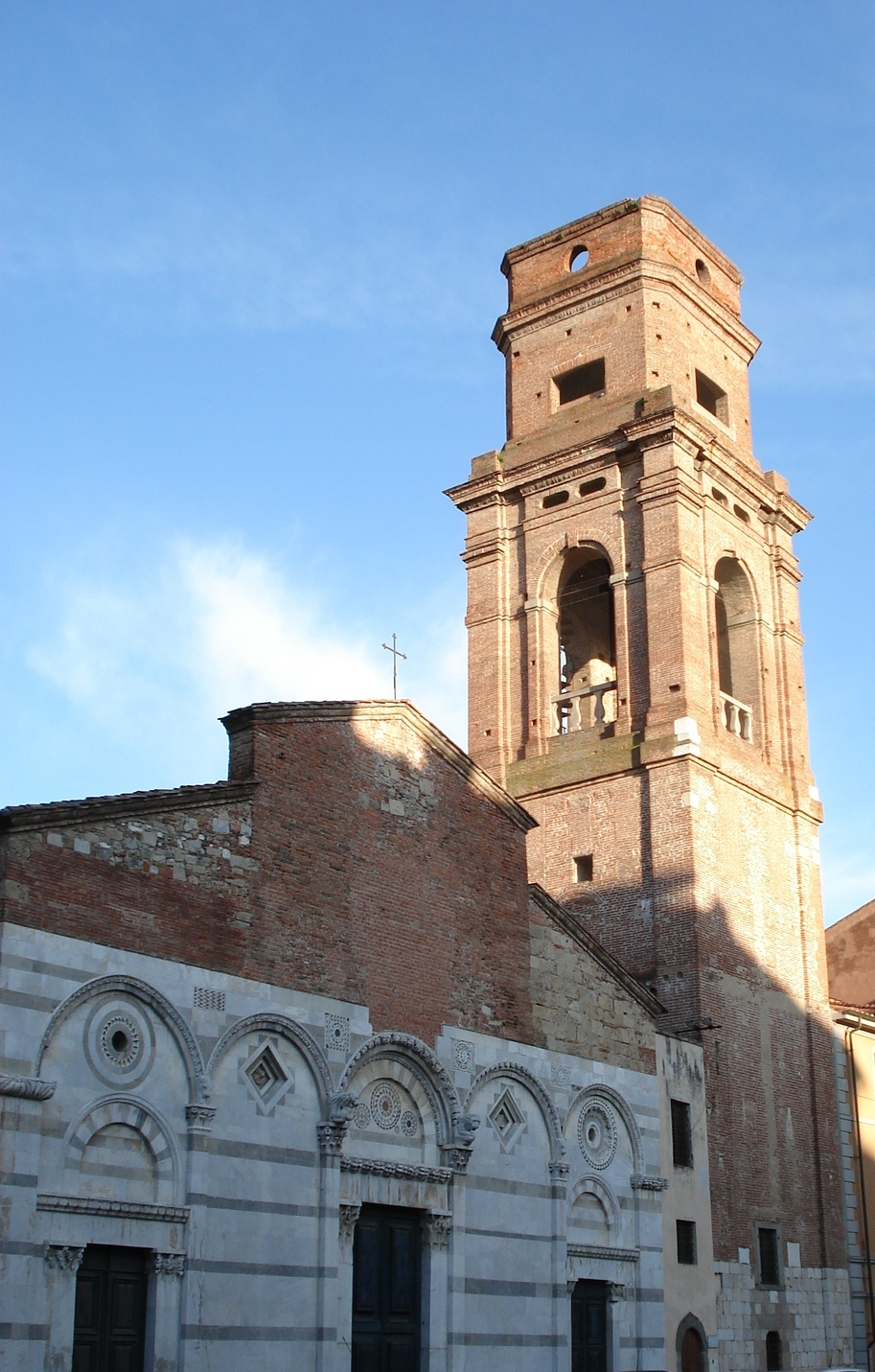 Facciata e campanile della chiesa san Paolo all'Orto - Pisa